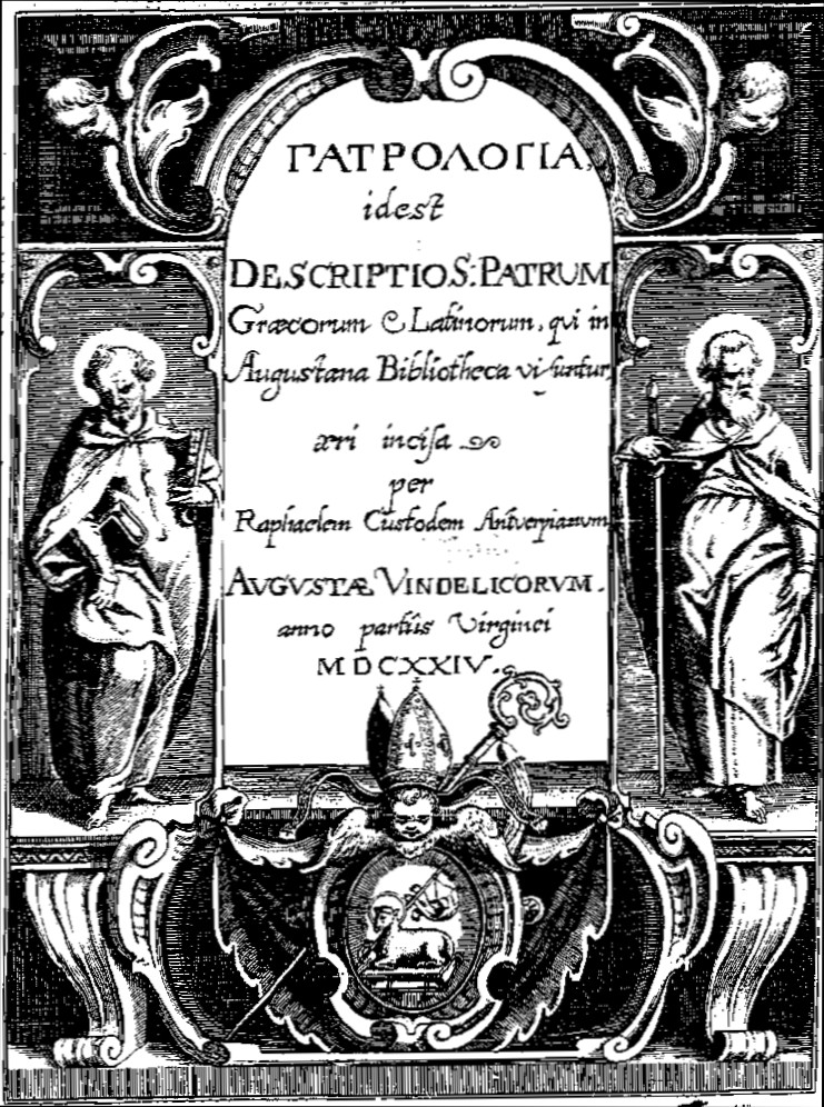 Patrologia, id est Descriptio S: Patrum Graecorum [et] Latinorum, qui in Augustana Bibliotheca visuntur / aeri incisa, per Raphaelem Custodem Antverpianum. Augustae Vindelicorum : [Custos]